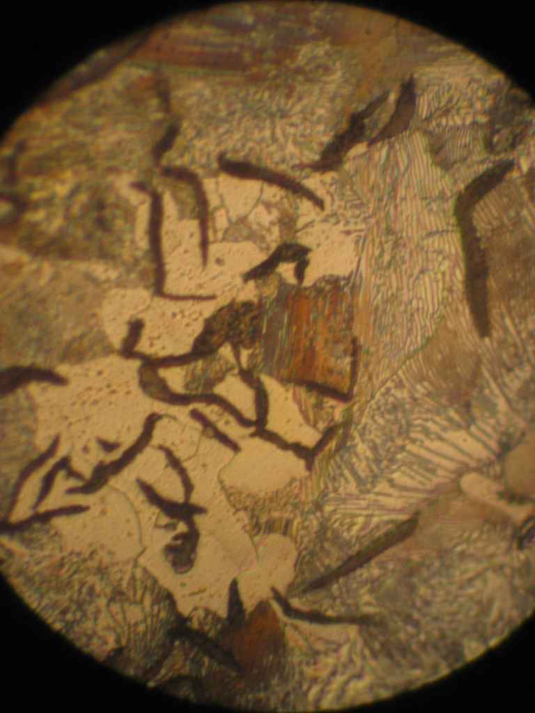 Fundición gris donde se observa granos de perlita y ferrita.